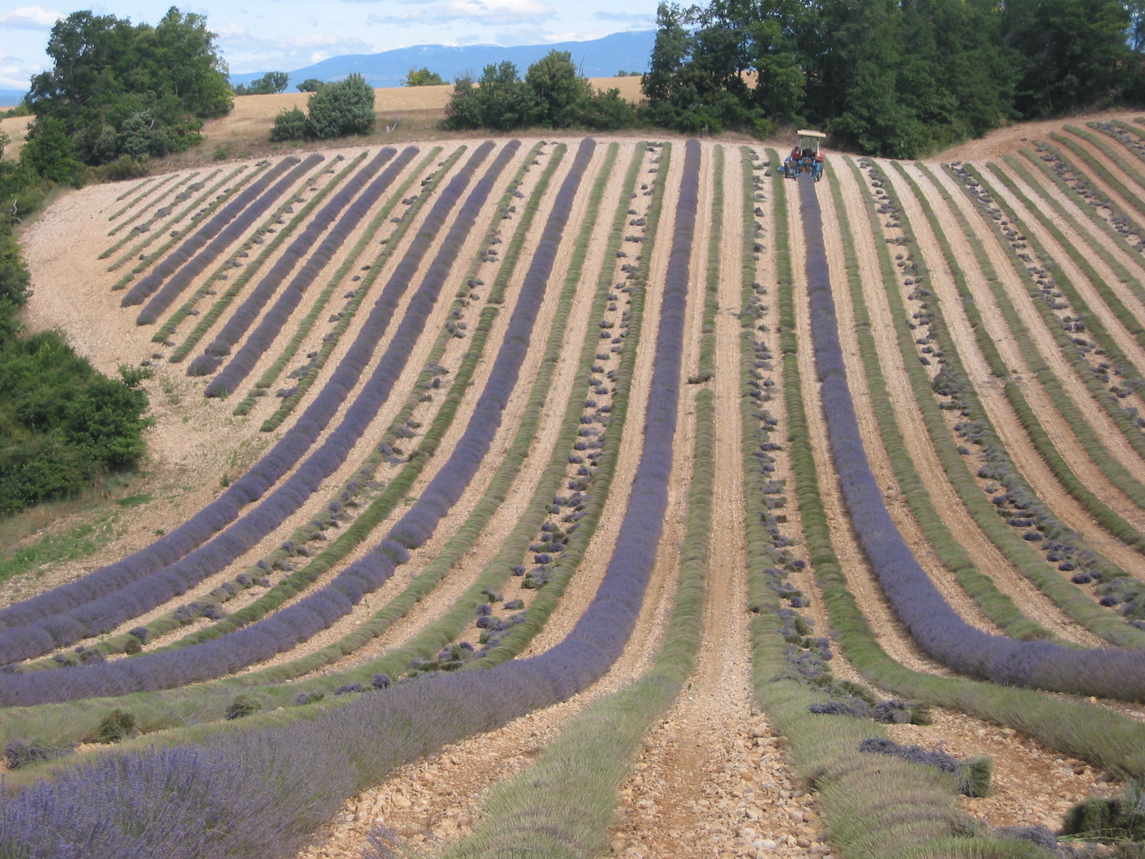 Plateau de Valensole, Alpes de Haute Provence, France. Champ de Lavande Photo prise le 8 Juillet 2005. Aut : Jddmano